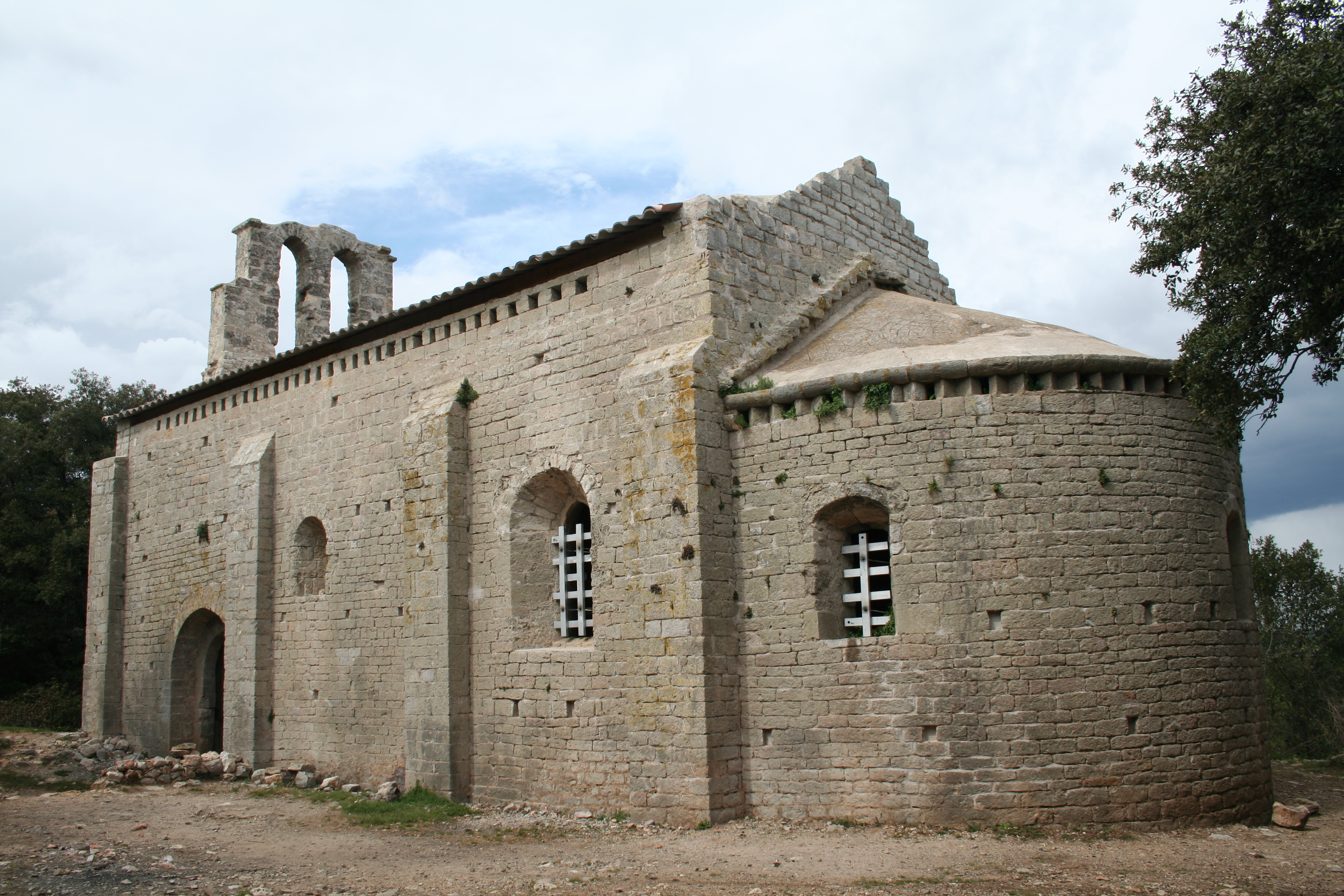 Aumelas (Hérault) - façade sud de la chapelle romane Saint-Martin de Cardonnet.